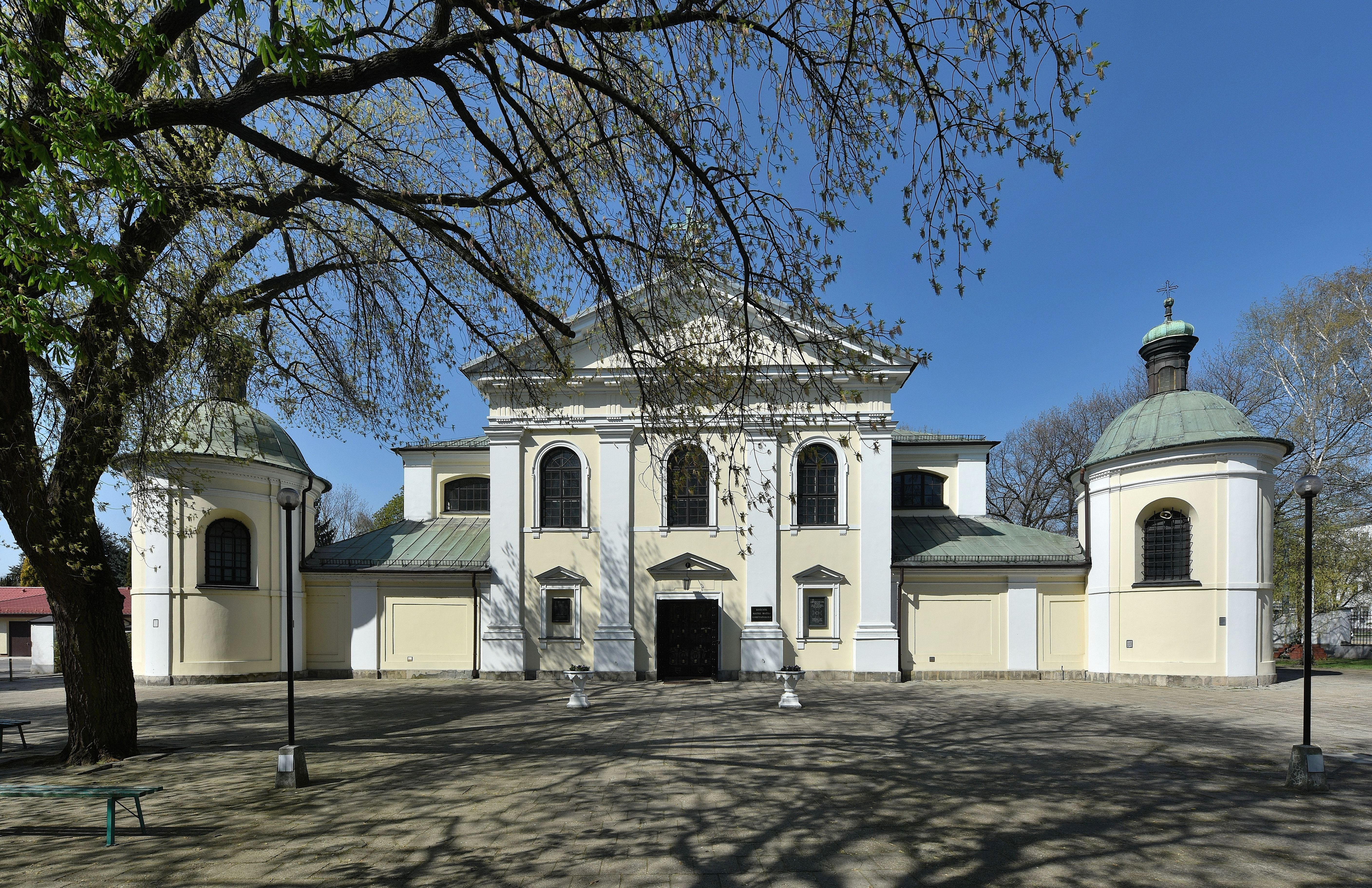 Kościół Najświętszej Matki Bożej Loretańskiej w Warszawie